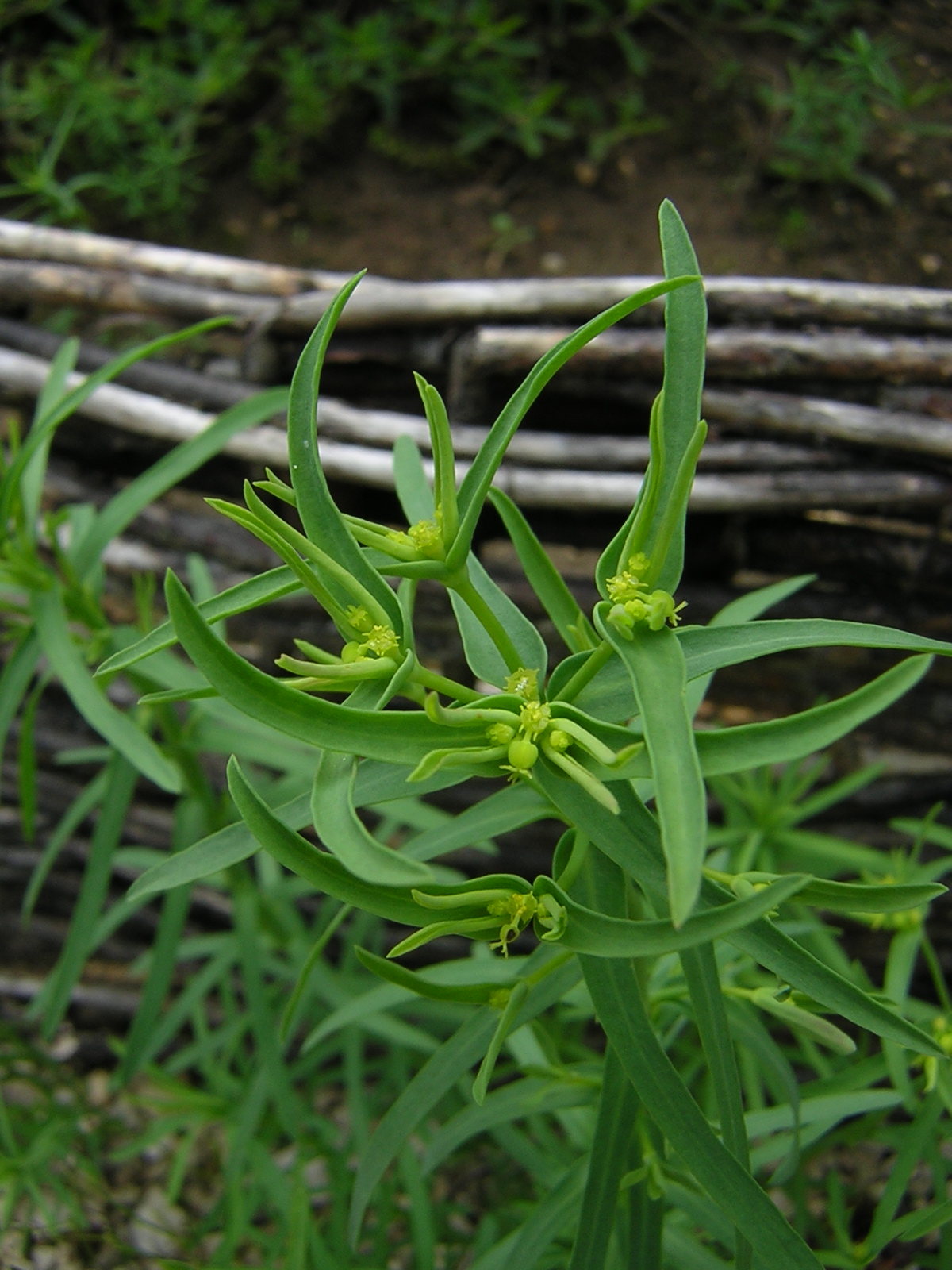 Euphorbia exigua (flowers), Joinville (Haute-Marne) - France